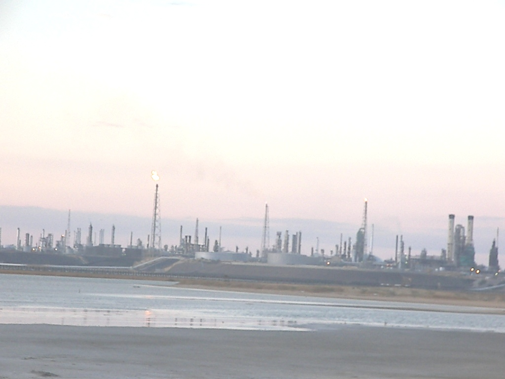 CRP Amuay.